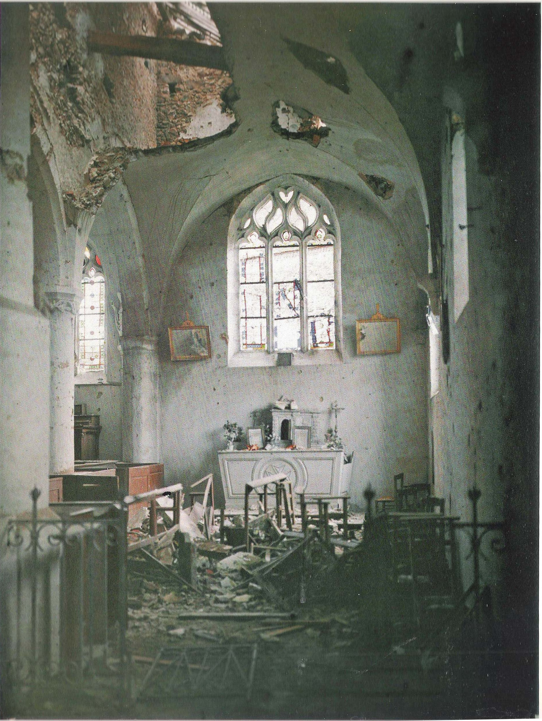 L'église_de_Montceaux_détruite_par_nos_75_en_seine_et_Marne_les_provins_livret n°3_page 39 .